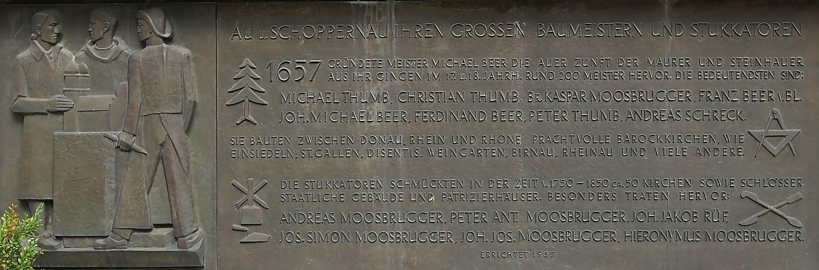 Gedenktafel am Kirchenaufgang der Auer Pfarrkirche für die grossen Auer und Schoppernauer Baumeister und Stukkatoren Caspar Moosbrugger, Franz Beer, Christian Thumb u.a. siehe auch Auer Zunft